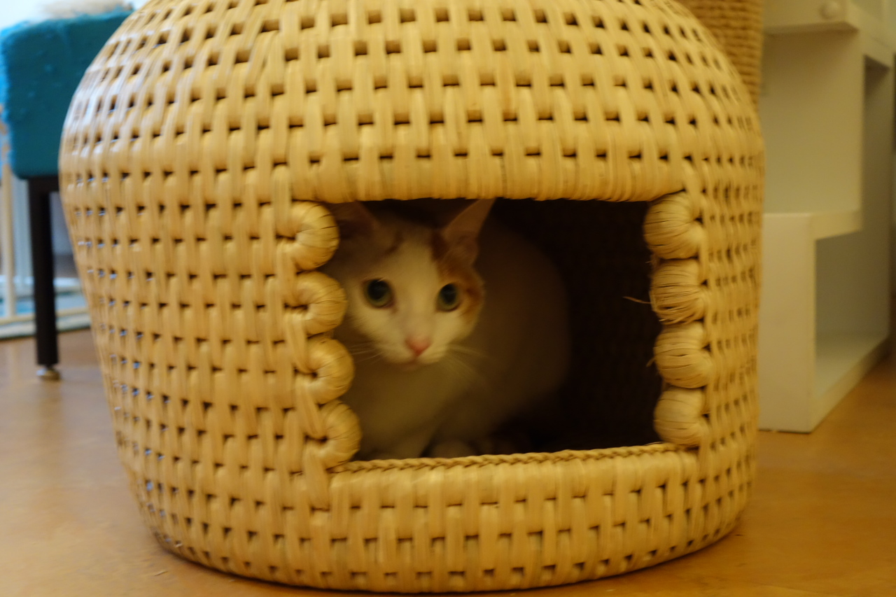 Cats